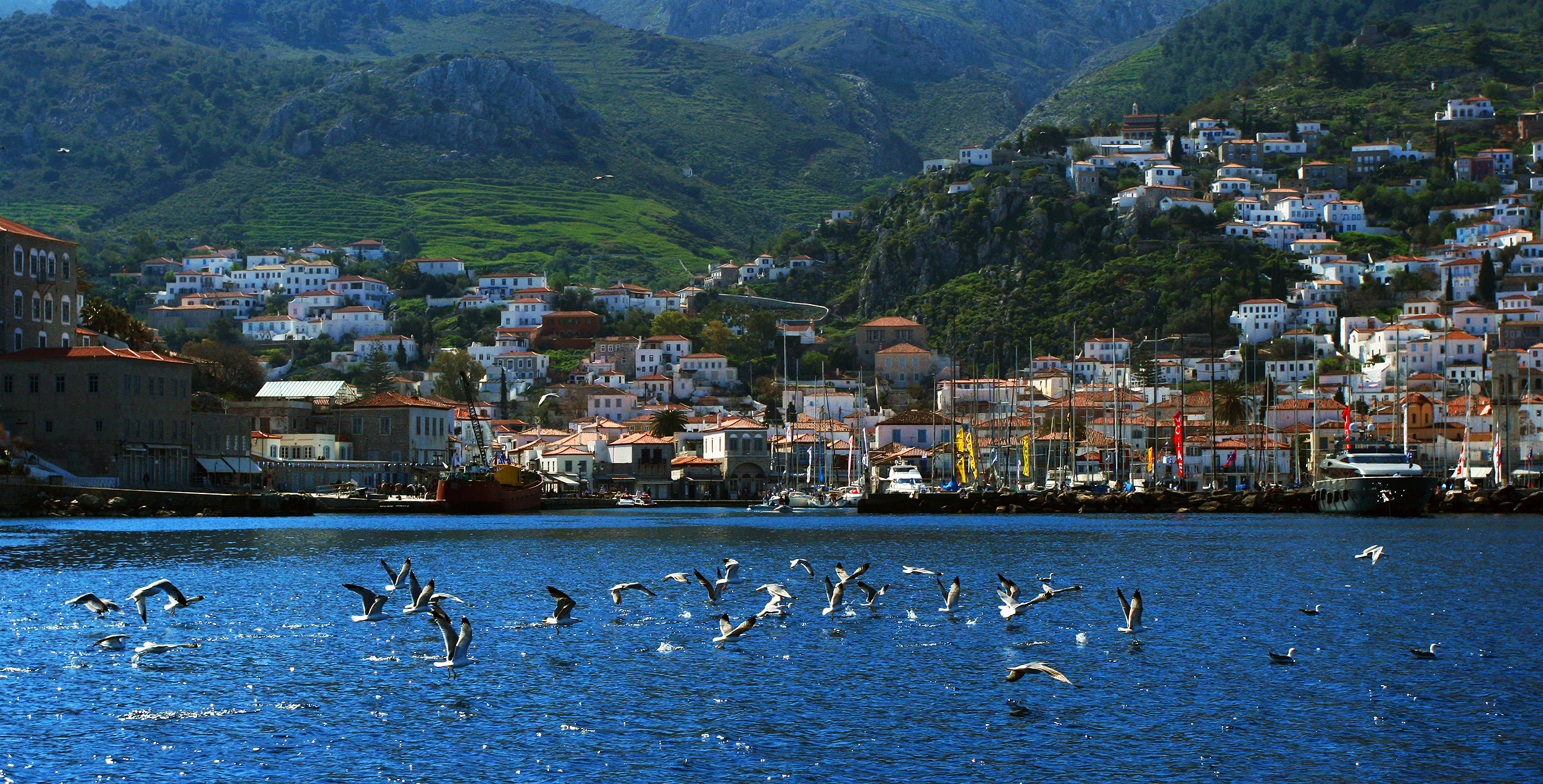 Παραδοσιακός οικισμός Ύδρας«Παραδοσιακός οικισμός Ύδρας»